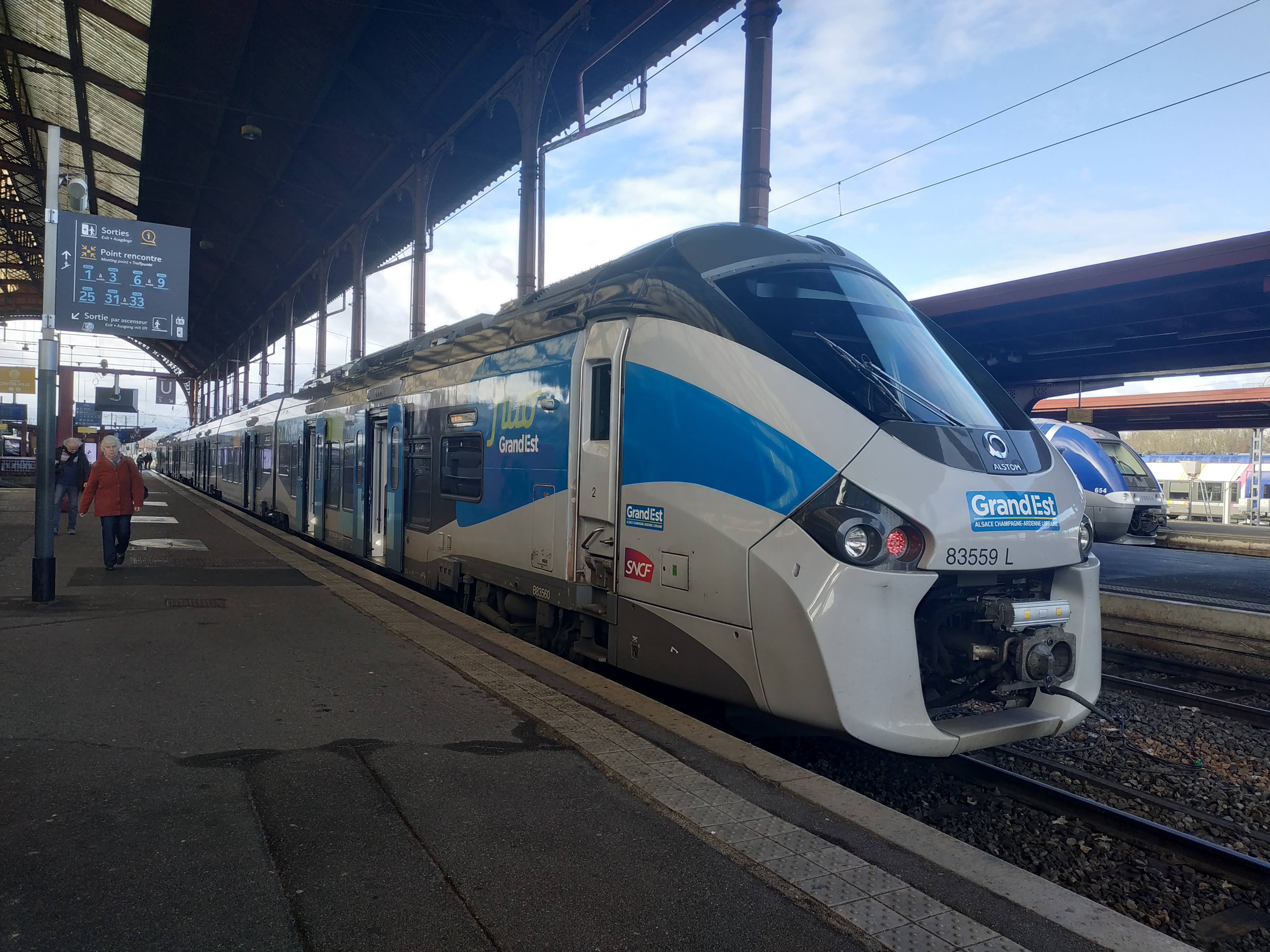 Alstom Regiolis B83559 du TER Grand Est en livrée Fluo Grand Est en Gare de Strasbourg